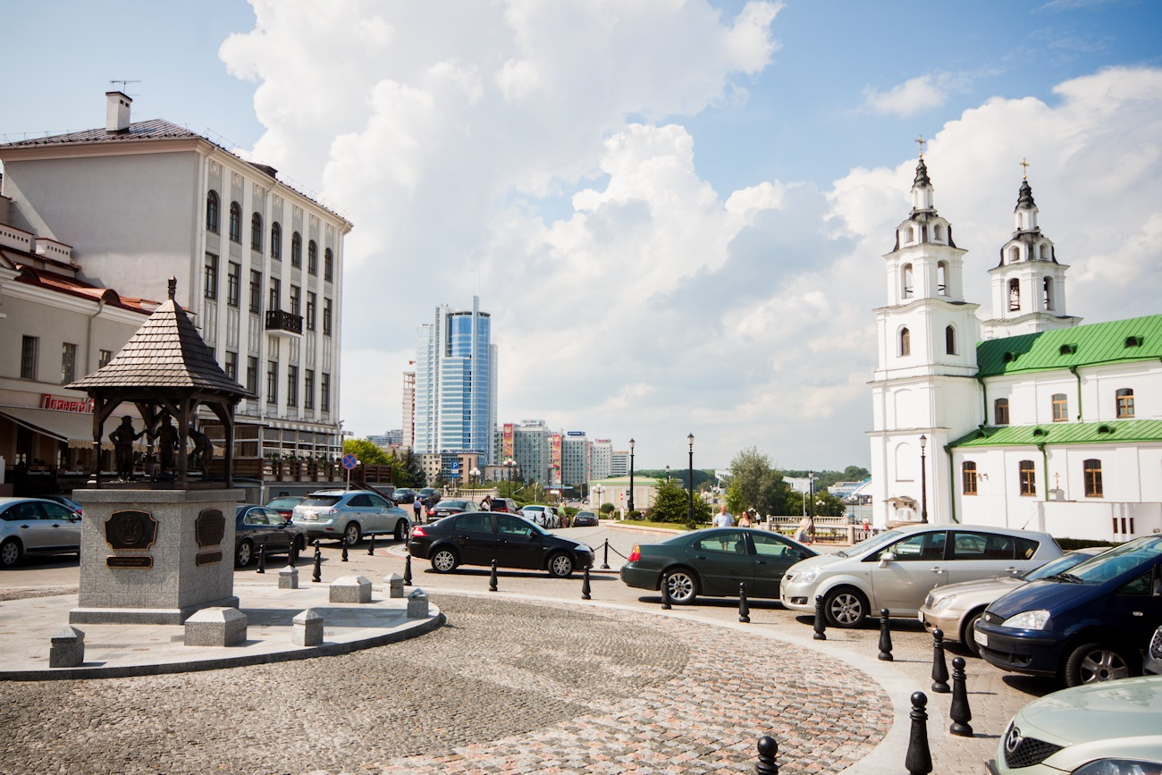 Vue du centre historique de Minsk, donnant sur les gratte-ciels au loin.